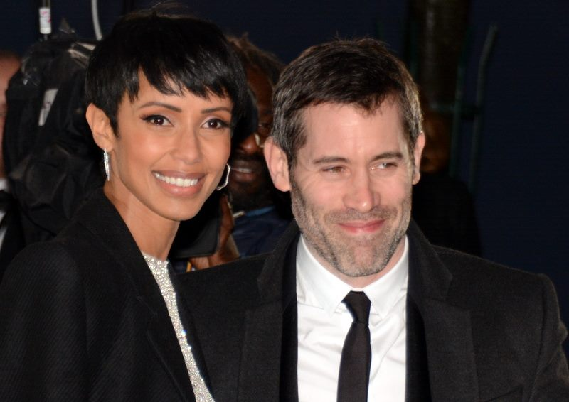 Sonia Rolland et Jalil Lespert à la cérémonie des César